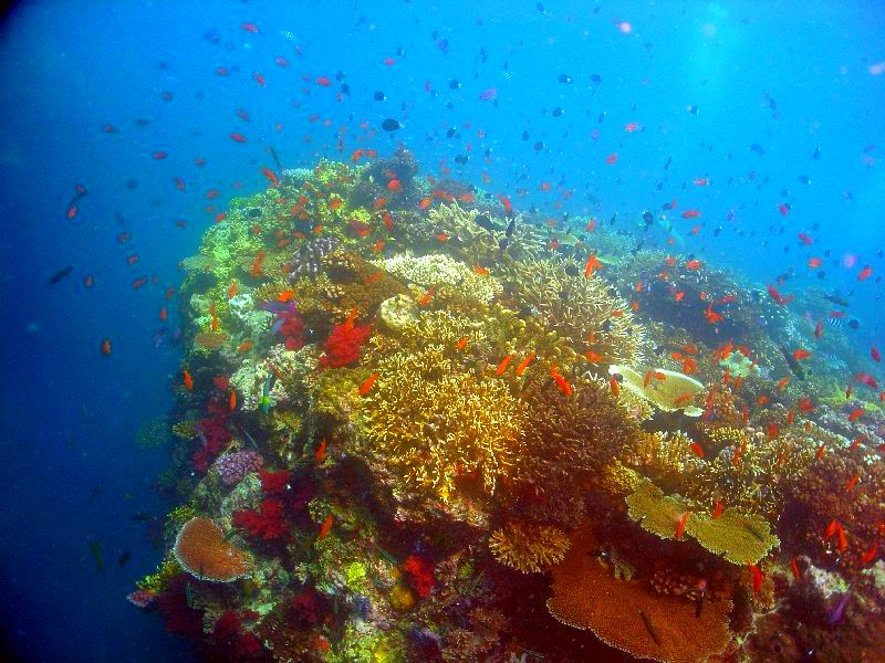 Coral Reef Fijipiju